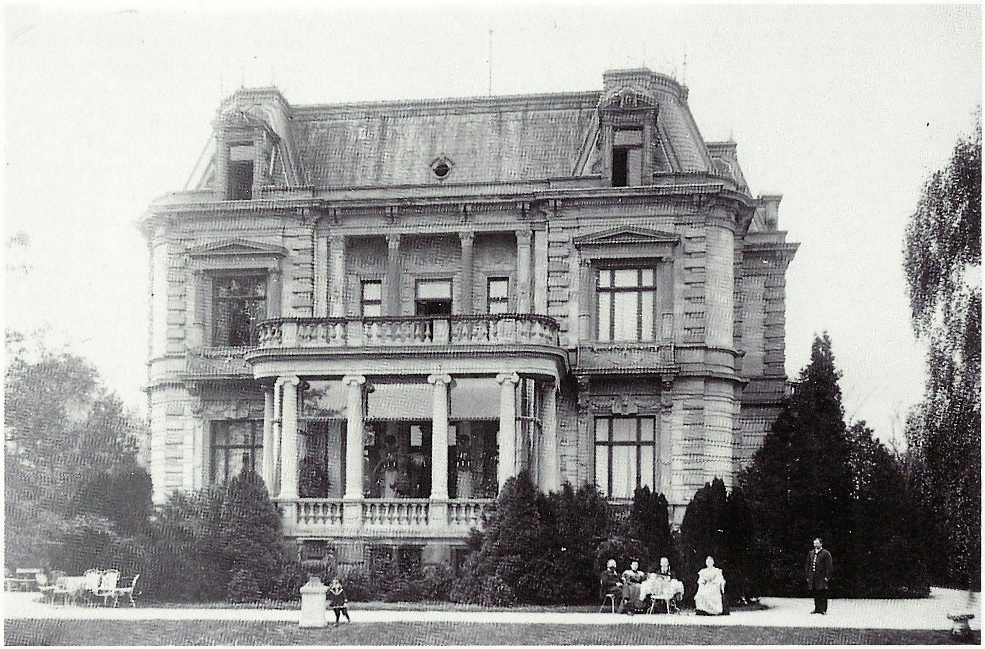 Villa Selve (1955 abgebrochen), Bonn: Rheinfront